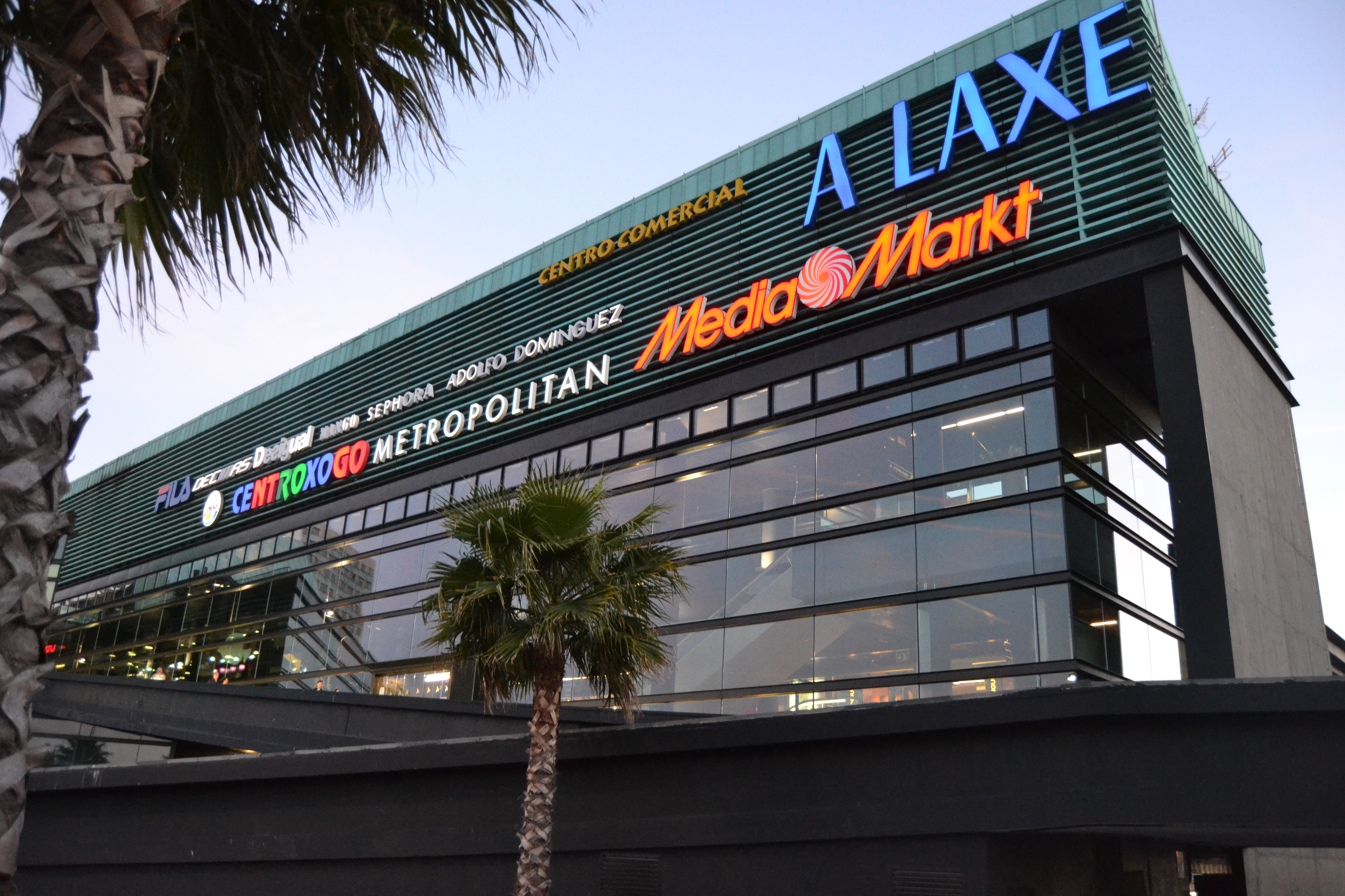 Centro Comercial A Laxe, en Vigo